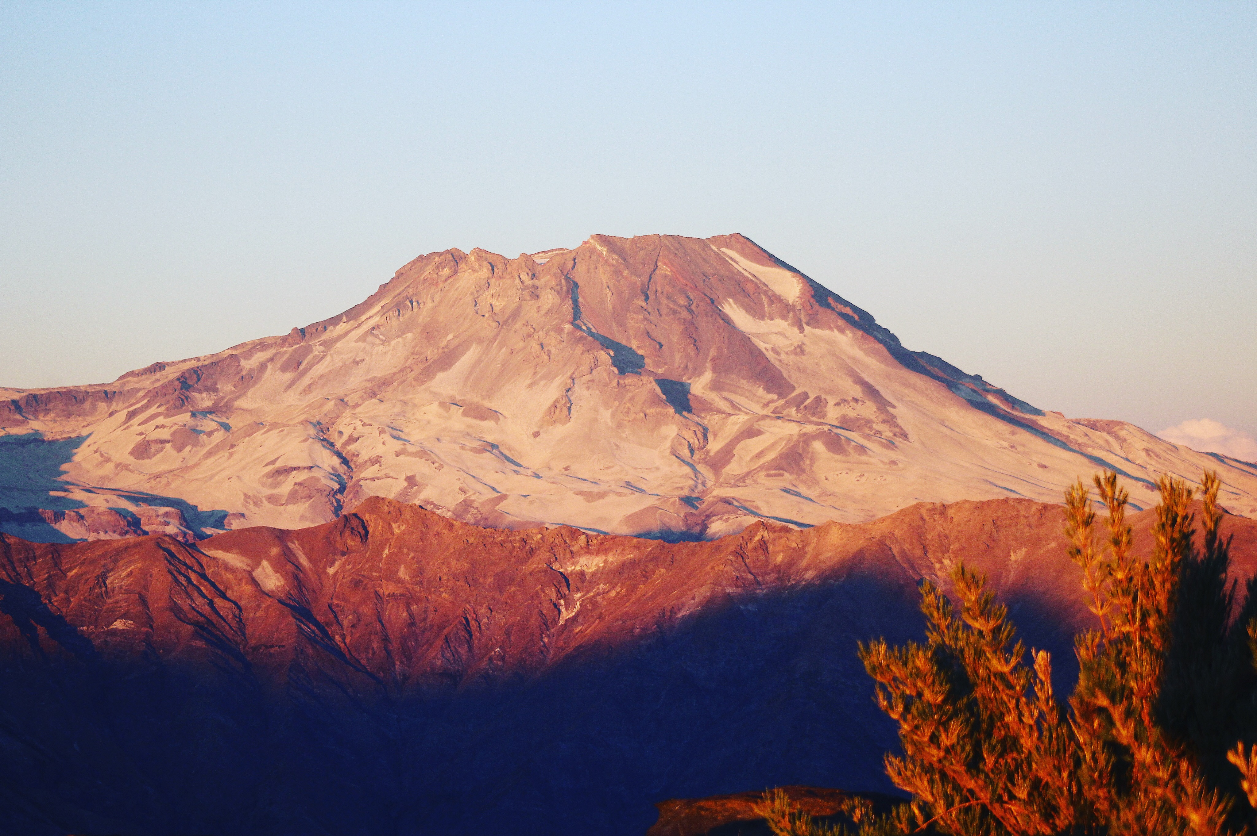 Esta fotografía se tomó desde un sector llamado enladrillado, zona de avistamiento de ovnis.